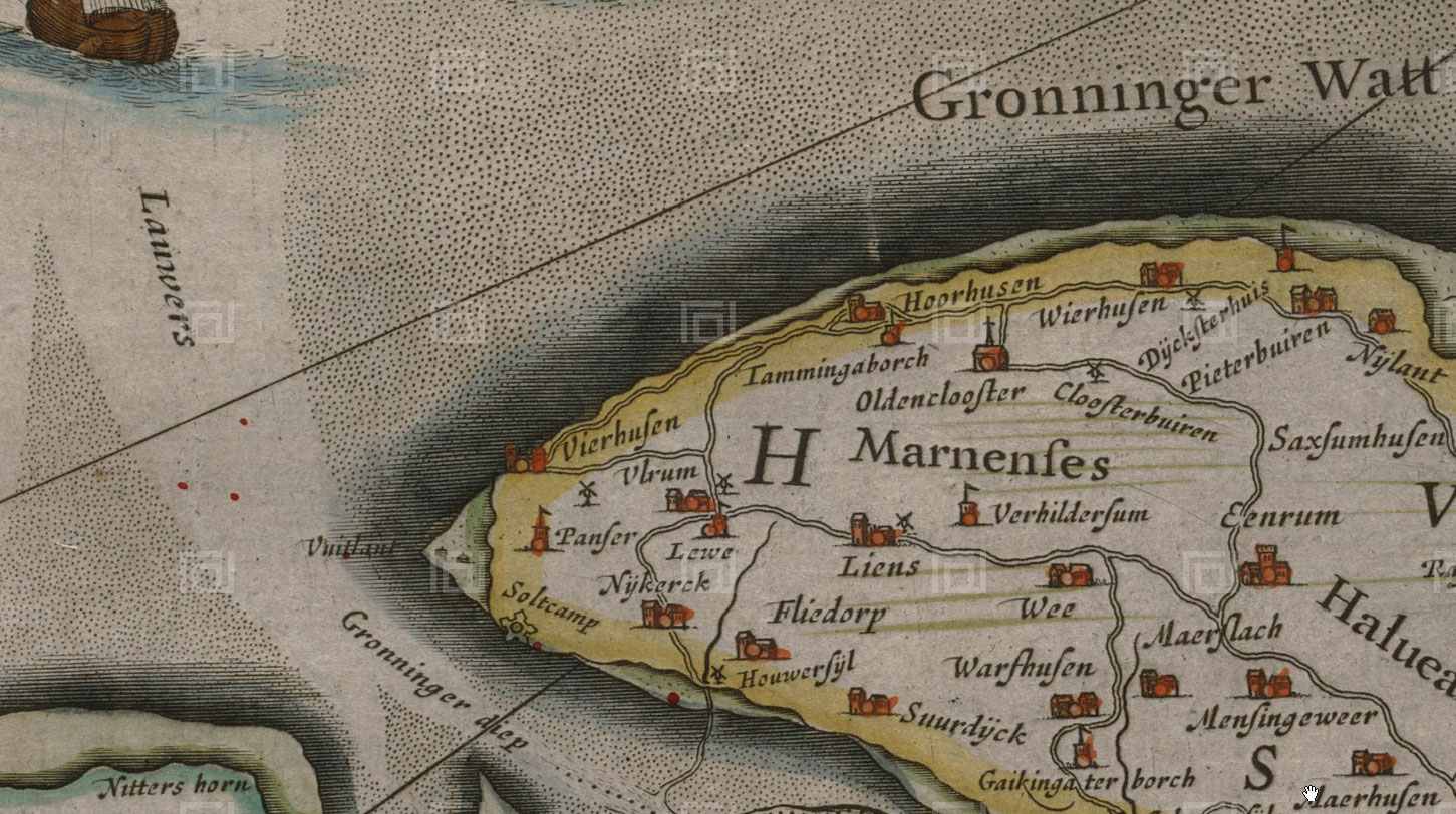 Detail van de kaart van het noordwestelijk deel van Groningen uit de atlas van Blaeu